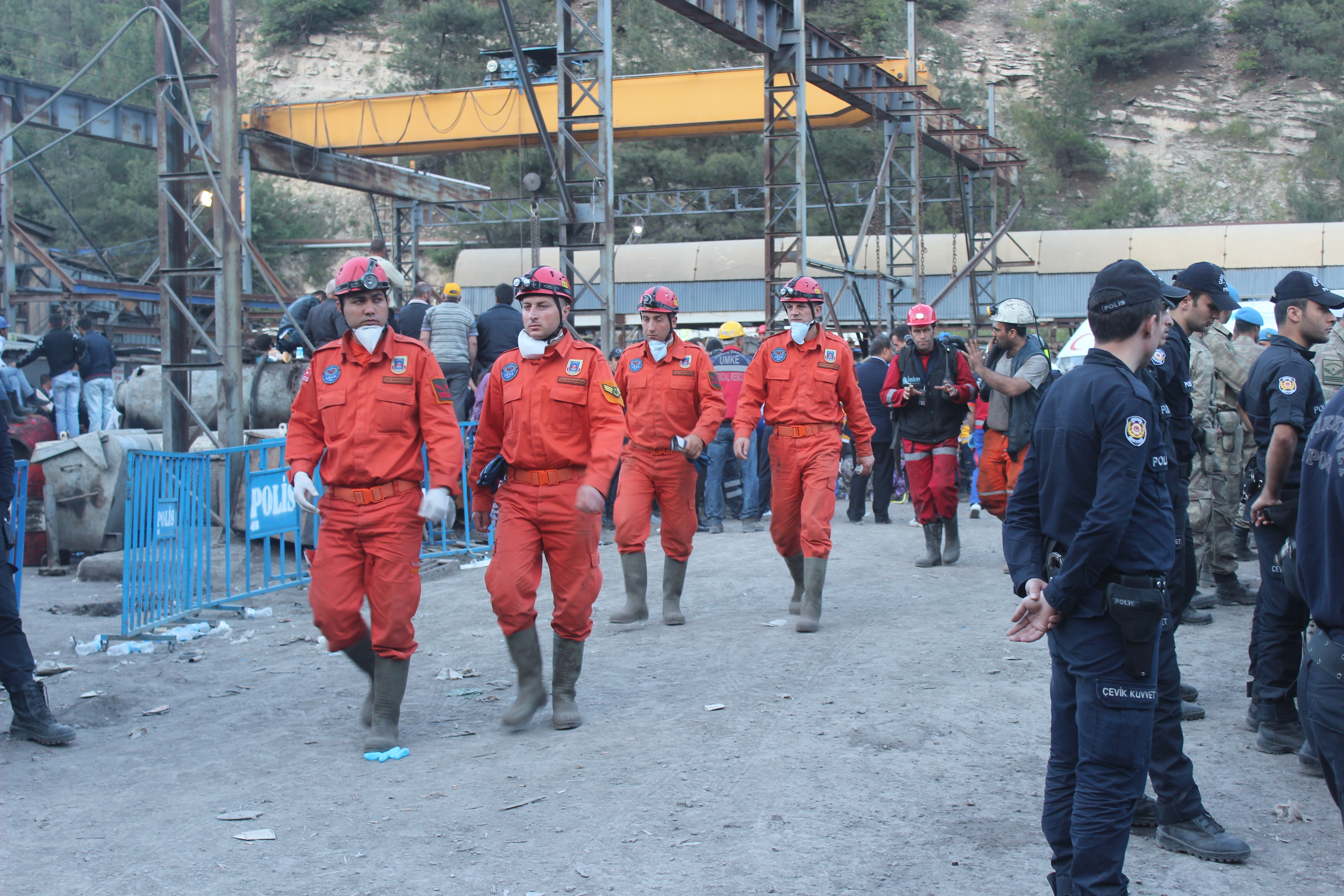 Soma'da Jandarma Komando Özel Asayiş Komutanlığı ekipleri